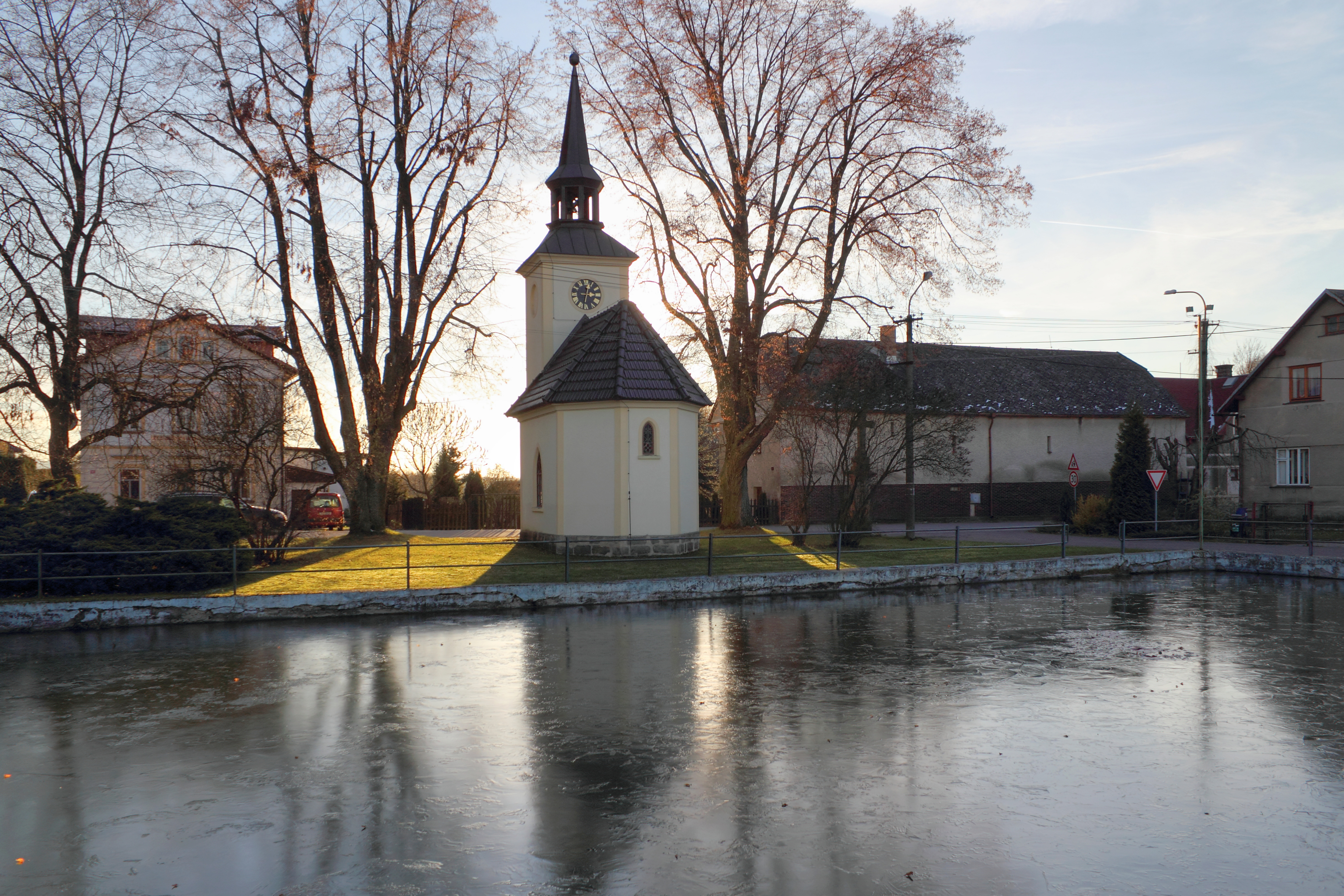 Pěnčín